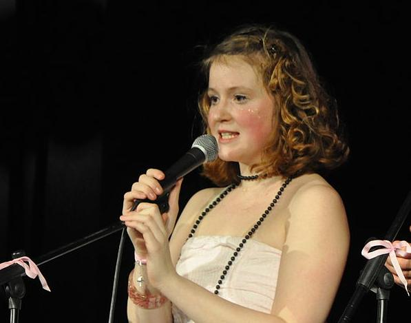 Marie Doležalová